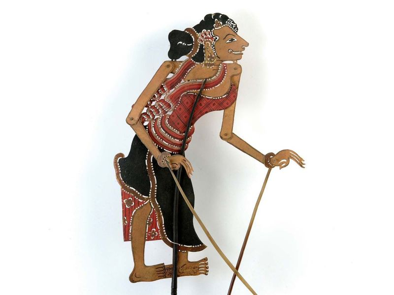 Schaduwfiguur. Vrouwelijke bediende.. Wajangfiguur voorstellende de vrouwelijke bediende Condong Unknown language: Wayang purwa